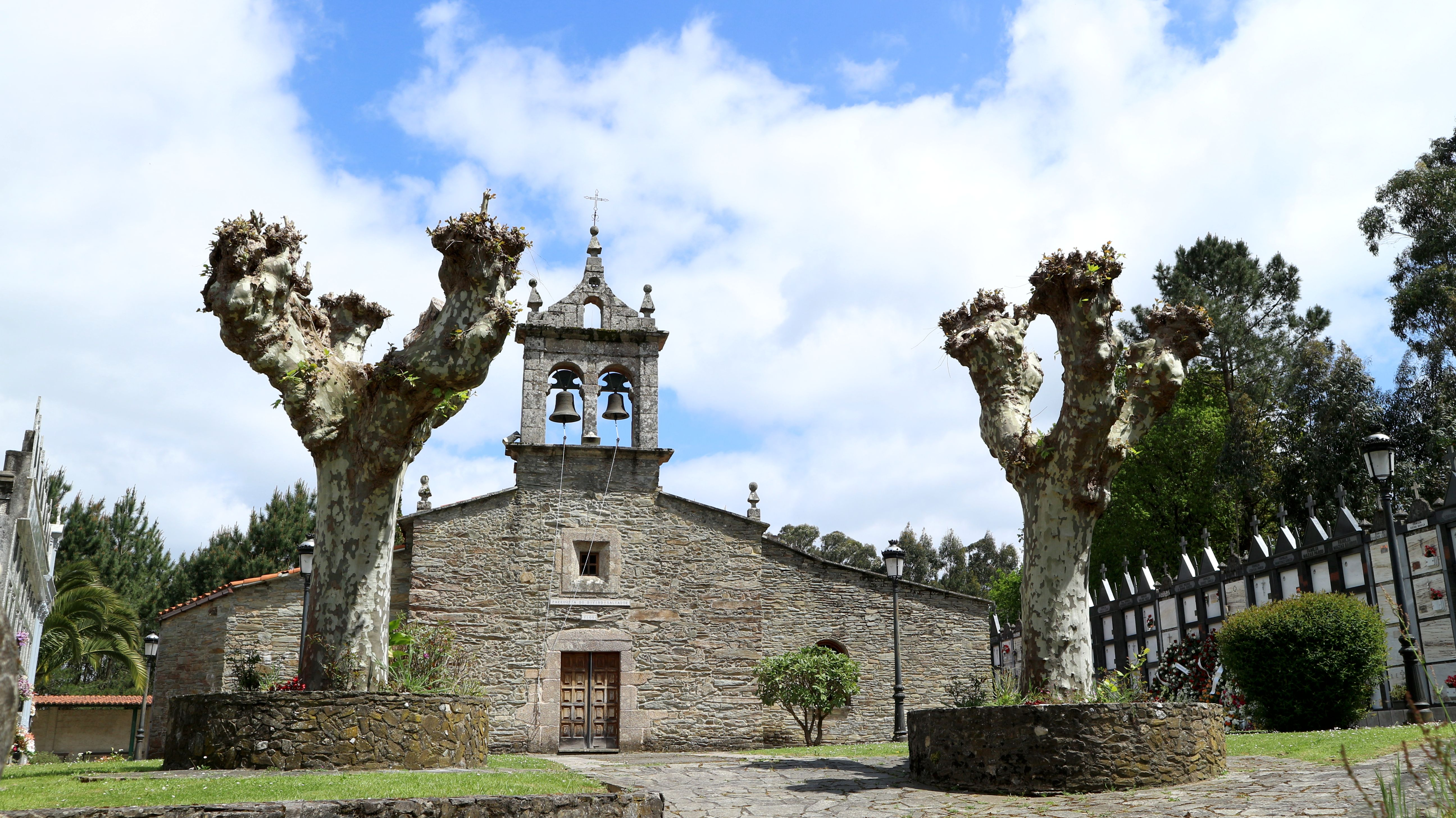 Igrexa de San Salvador de Viós. En Viós, Abegondo.